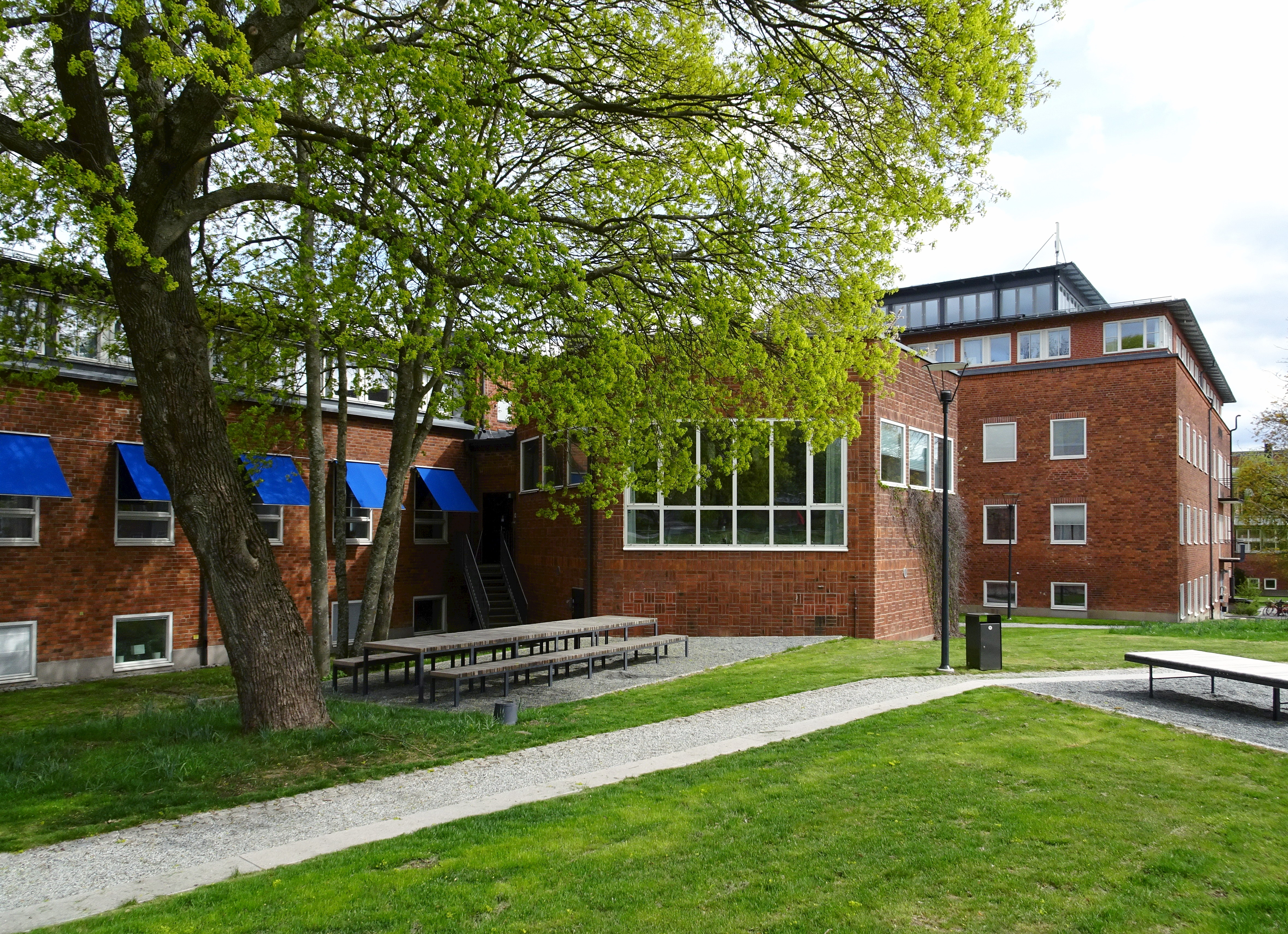 Campus Solna, Nobels väg 5. Ursprungligen Byggnaden för kemiska institutionen uppförd 1950. Sedan 1997 Karolinska Institutets administration, arkitekt Ture Ryberg